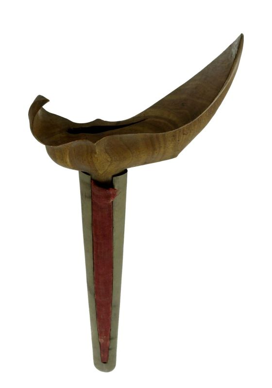 Schede. Houten krisschede